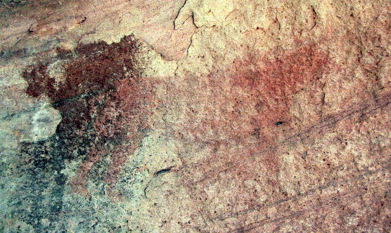 Detalle de panel decorado (toro estático: natural) en el Abrigo de la Hoya de los Navarejos I, Rodeno de Tormón (Teruel), Parque Cultural de Albarracín [Tomado del panel informativo] (2018).